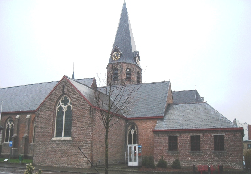 Limburgs: Blasiuskèrk in Lendelede.